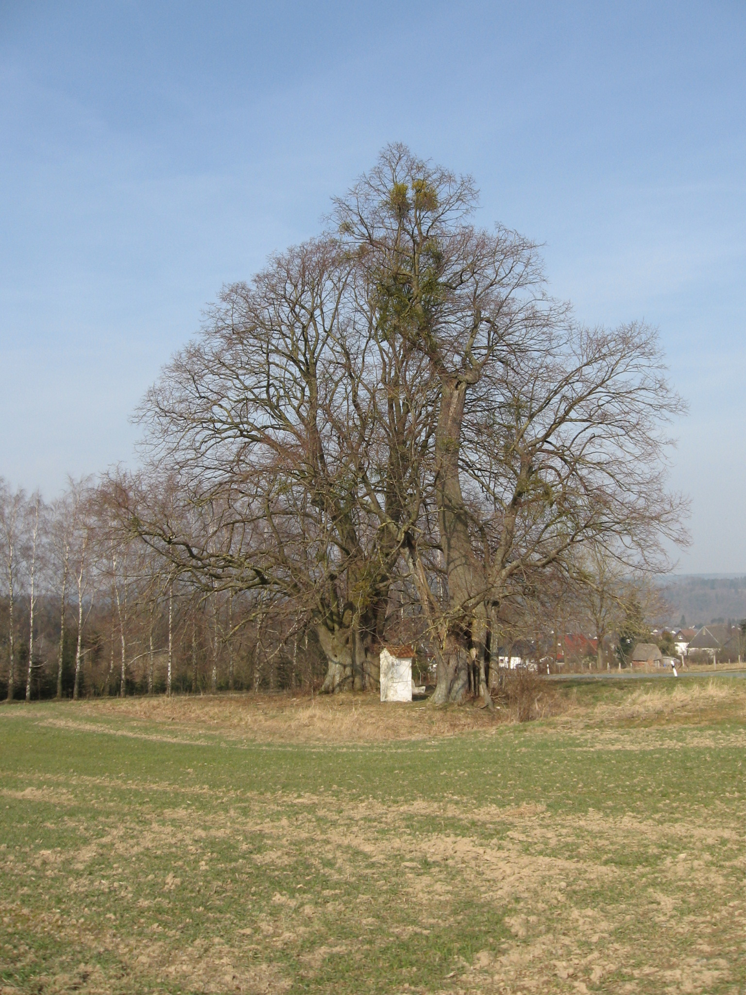 Das Naturdenkmal 2 Linden westlich von Alme von Süden.